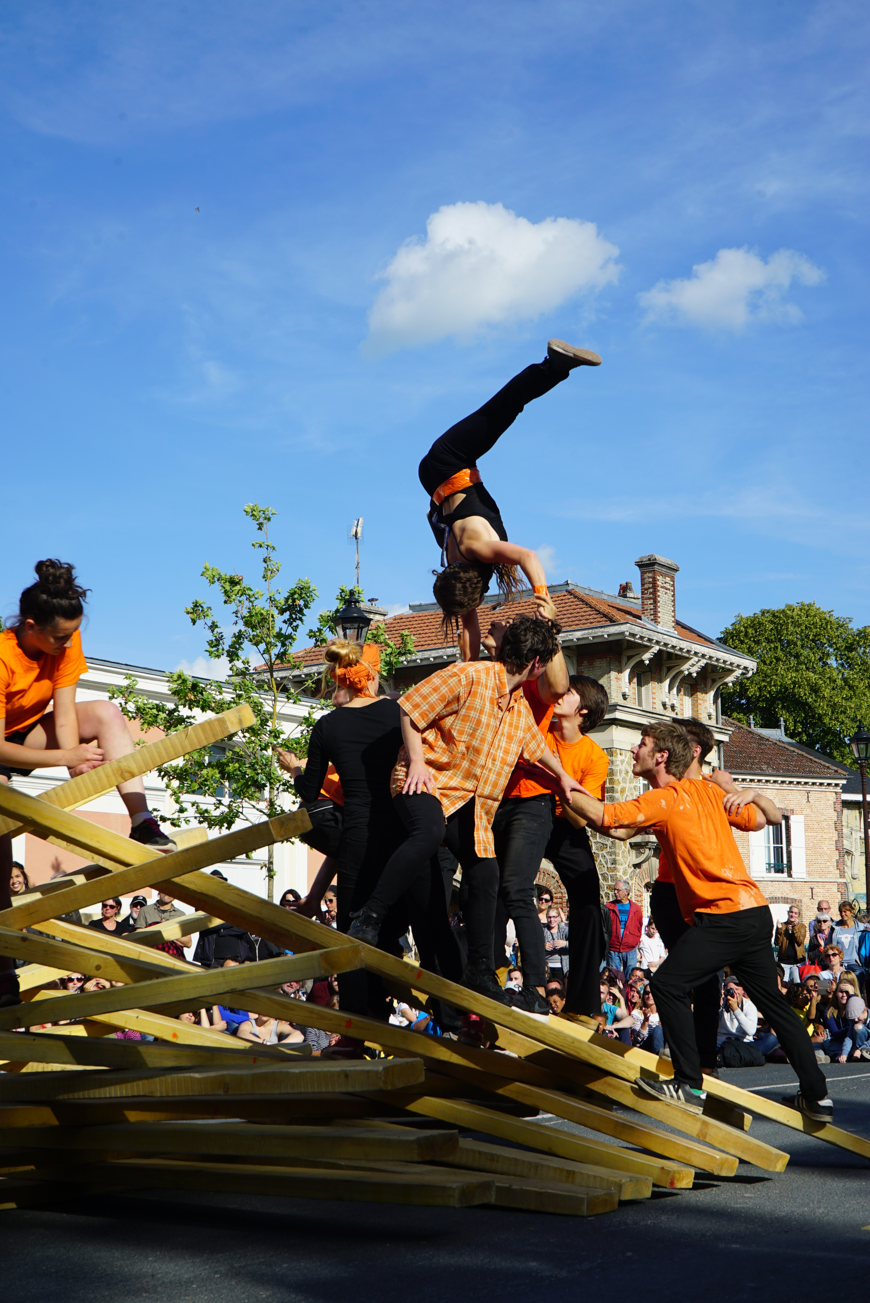 la trentième promotion du CNAC & la compagnie InExtremiste lors de Furies, en 2017.